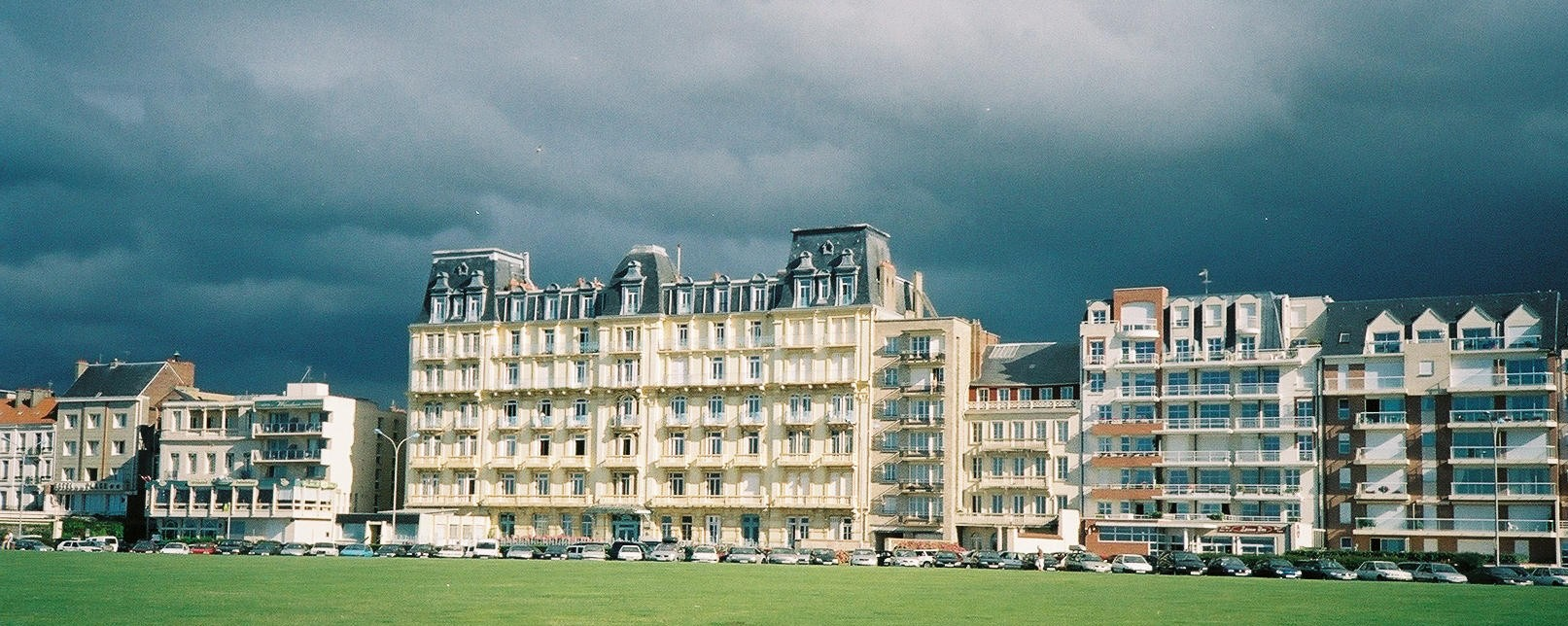 Ancien hôtel Royal sur le boulevard de Verdun en 2004.